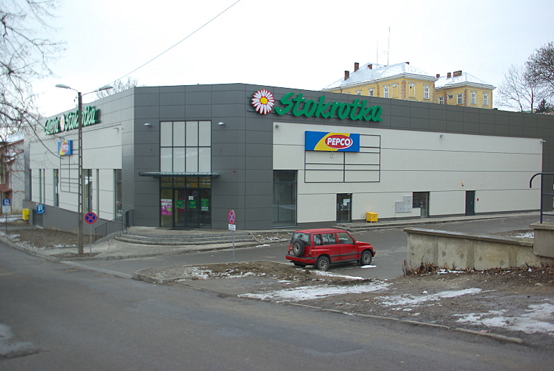 Galeria Handlowa przy ul. Feliksa Gieli w Sanoku, Stokrotka